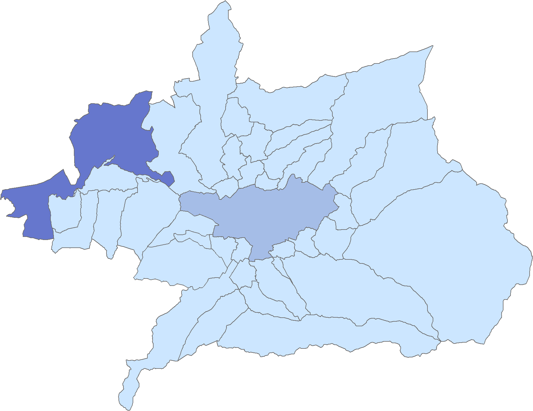 Situación del municipio de Pinos Puente respecto a la comarca de la Vega de Granada, en España.